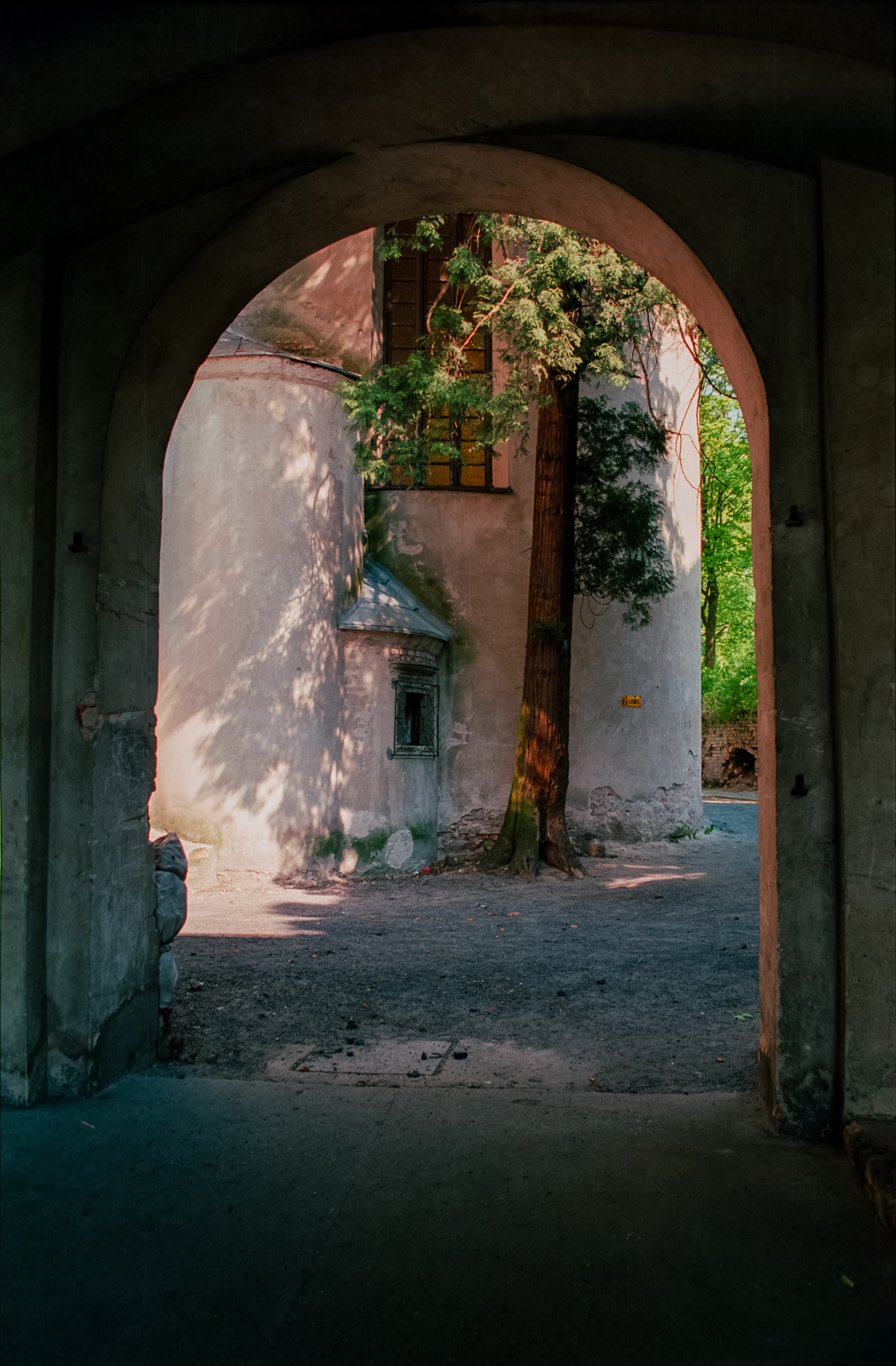 Siedlisko, kaplica zamkowa